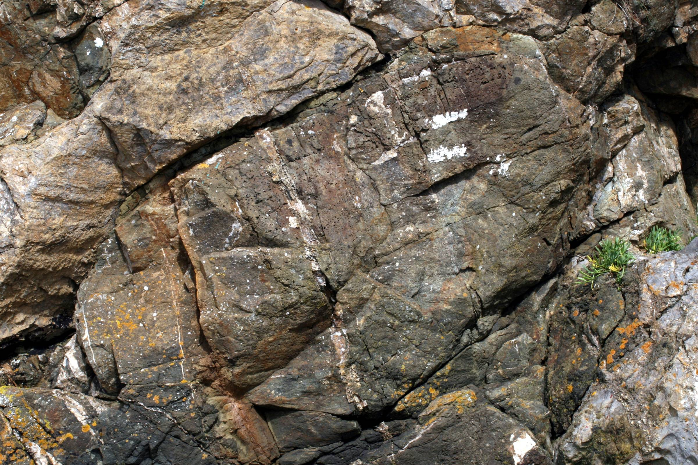 L’affleurement au sud-ouest de l’îlot de Rozan expose des pillow lava superposés d’assez grande taille (50 cm à 1m) cimentés par du calcaire grisâtre. On y observe en périphérie des oreillers en coussin des vacuoles et une croûte vitreuse. Les divers filons blanchâtres de calcite sont postérieurs.